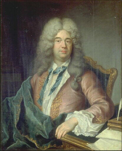 Source : Ministère de la culture, base Joconde.